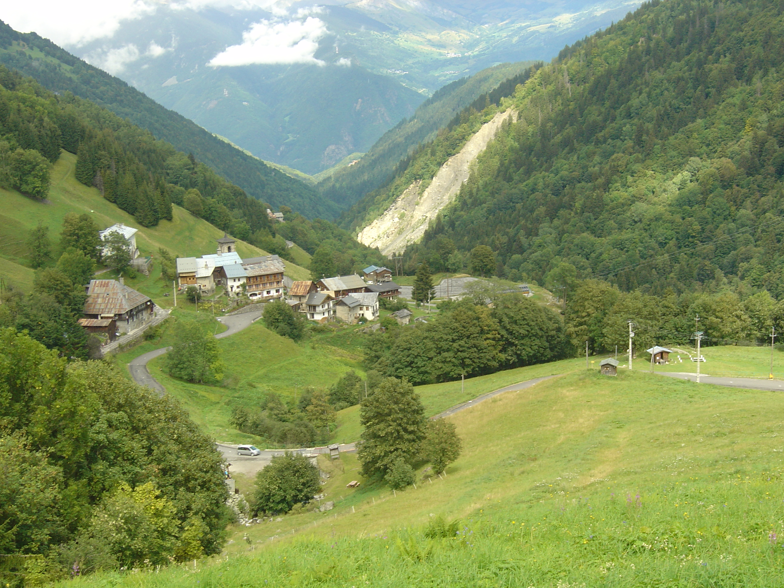 Village pittoresque de Celliers dans l'ascension du col de la Madeleine par le versant nord